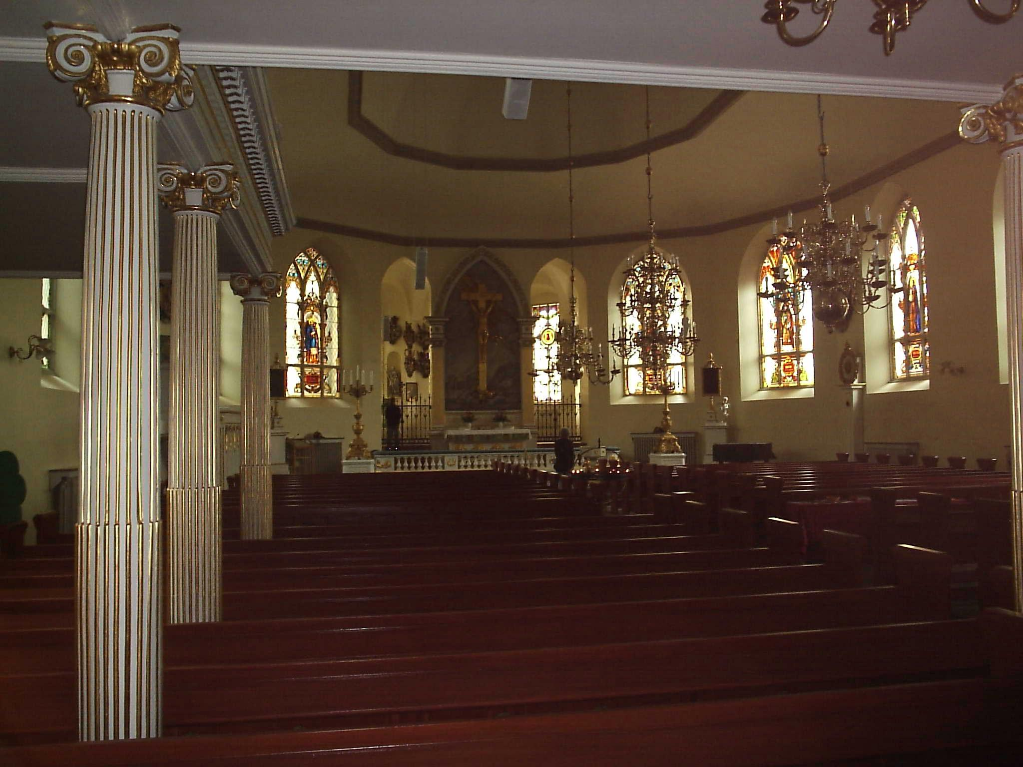 Kyrkorummet i Tyska kyrkan i Göteborg, den 13 september 2005. Bilden är fotograferad av Harri Blomberg.